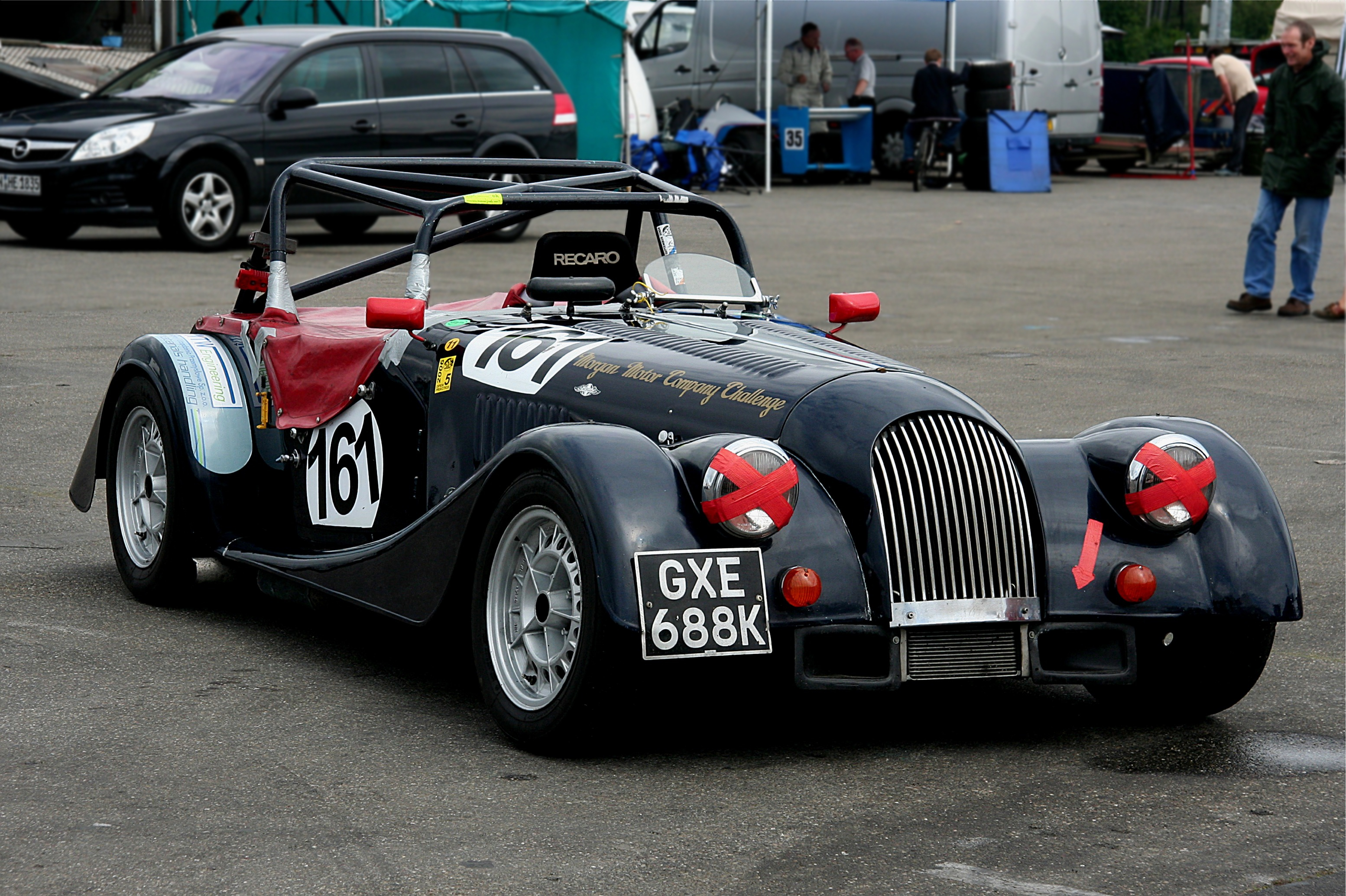 Morgan Plus 8, Baujahr 1976, im Renntrimm beim Oldtimer Festival 2007 im Fahrerlager des Nürburgrings